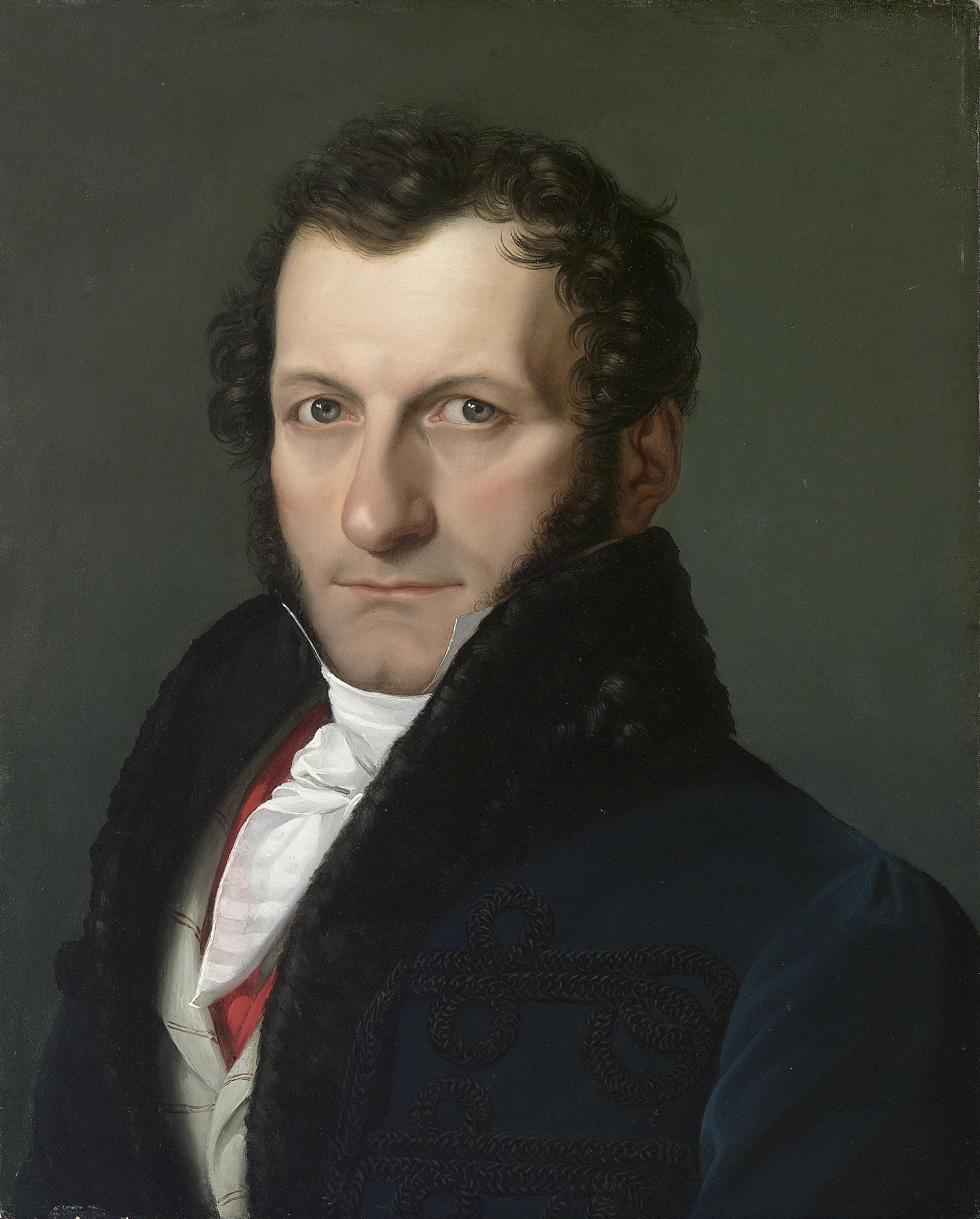 Bildnis des Sammlers und Mäzens Conte Colonnello Teodoro Arese Lucini, Öl auf Holz, 46,5 x 37 cm